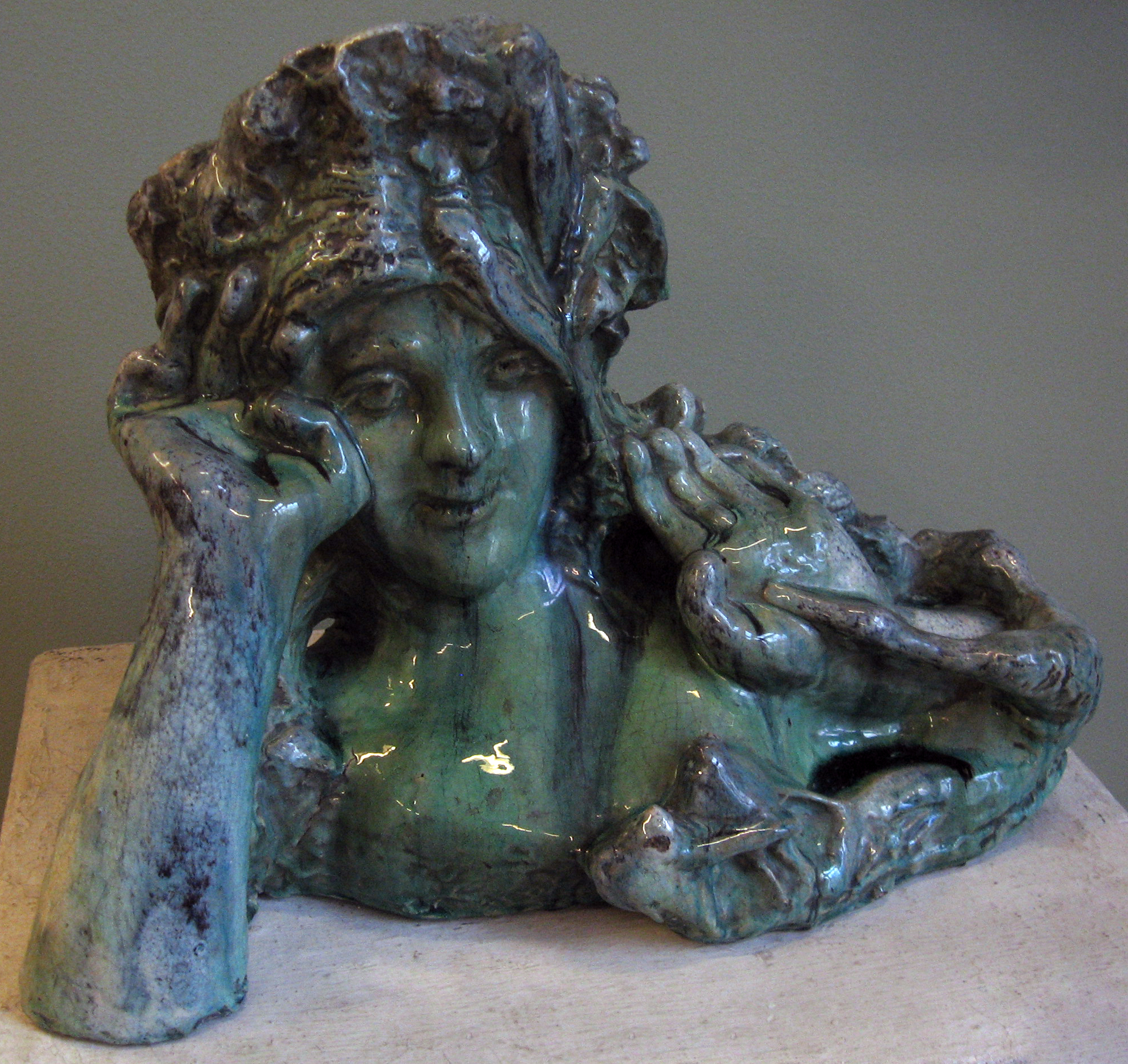 Sculpture by Михаил Врубель "Волхова. Морская царевна", 1899-1900